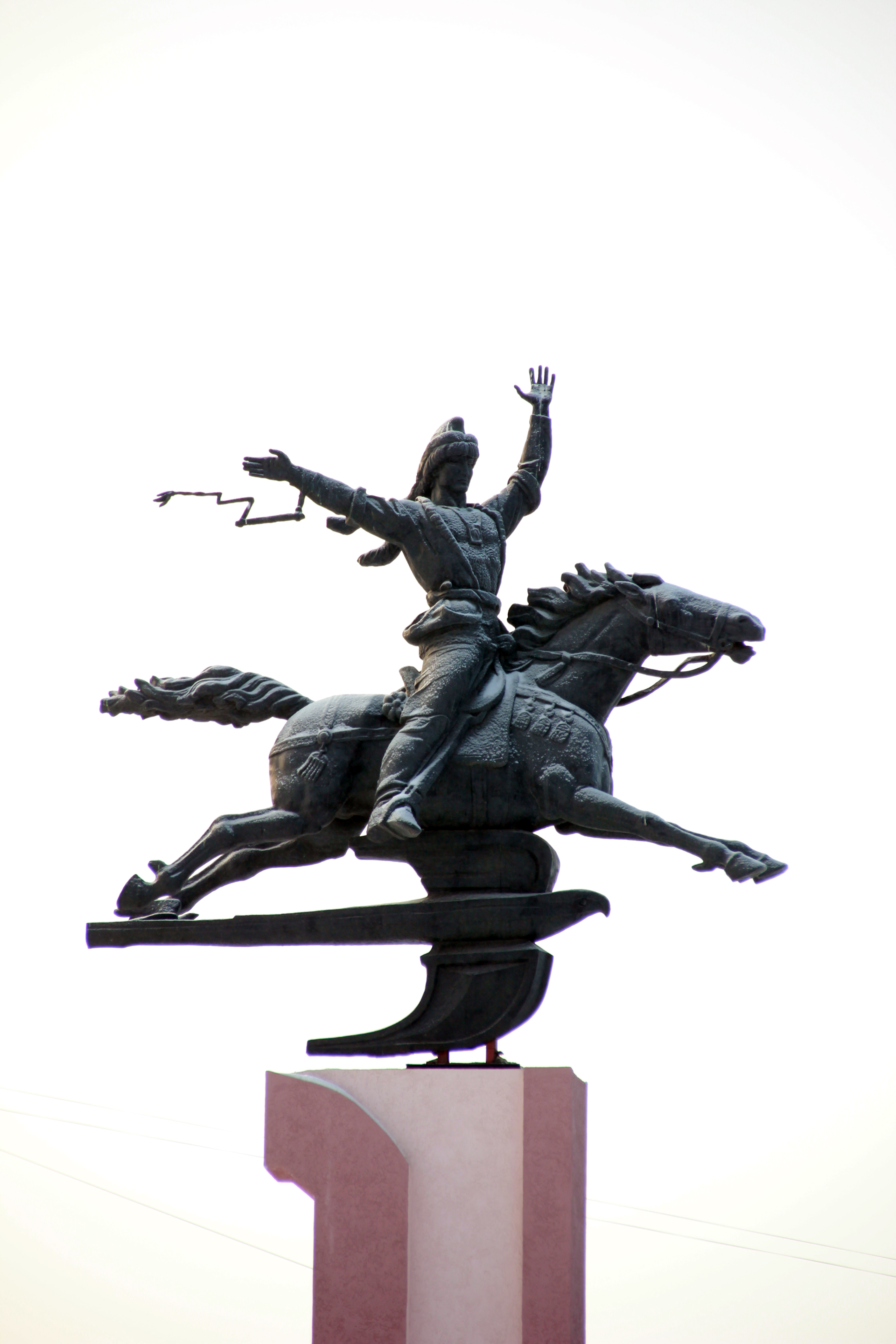 Памятник Салавату Юлаеву Зовущий за собой: улица Северная (въезд в город), Салават, Башкортостан